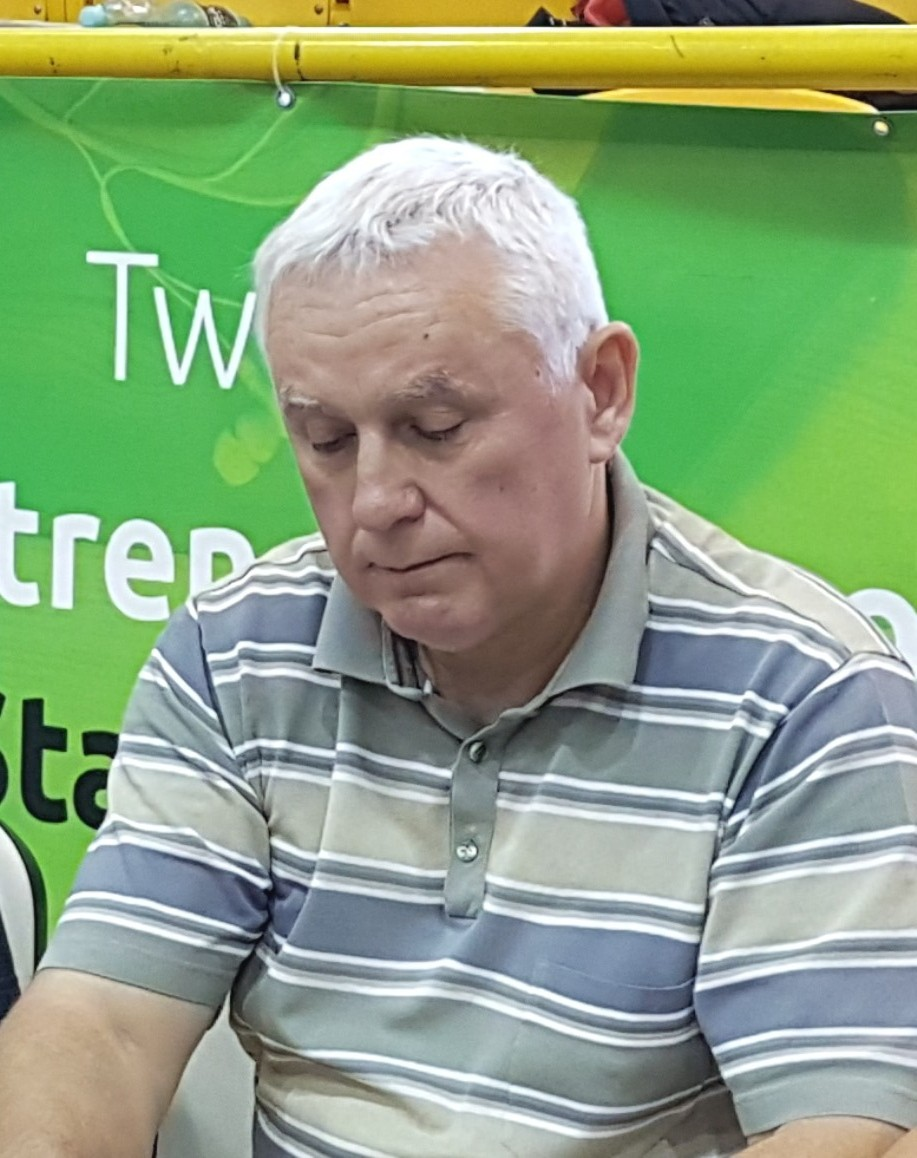 Prezes Julian Pawłasek